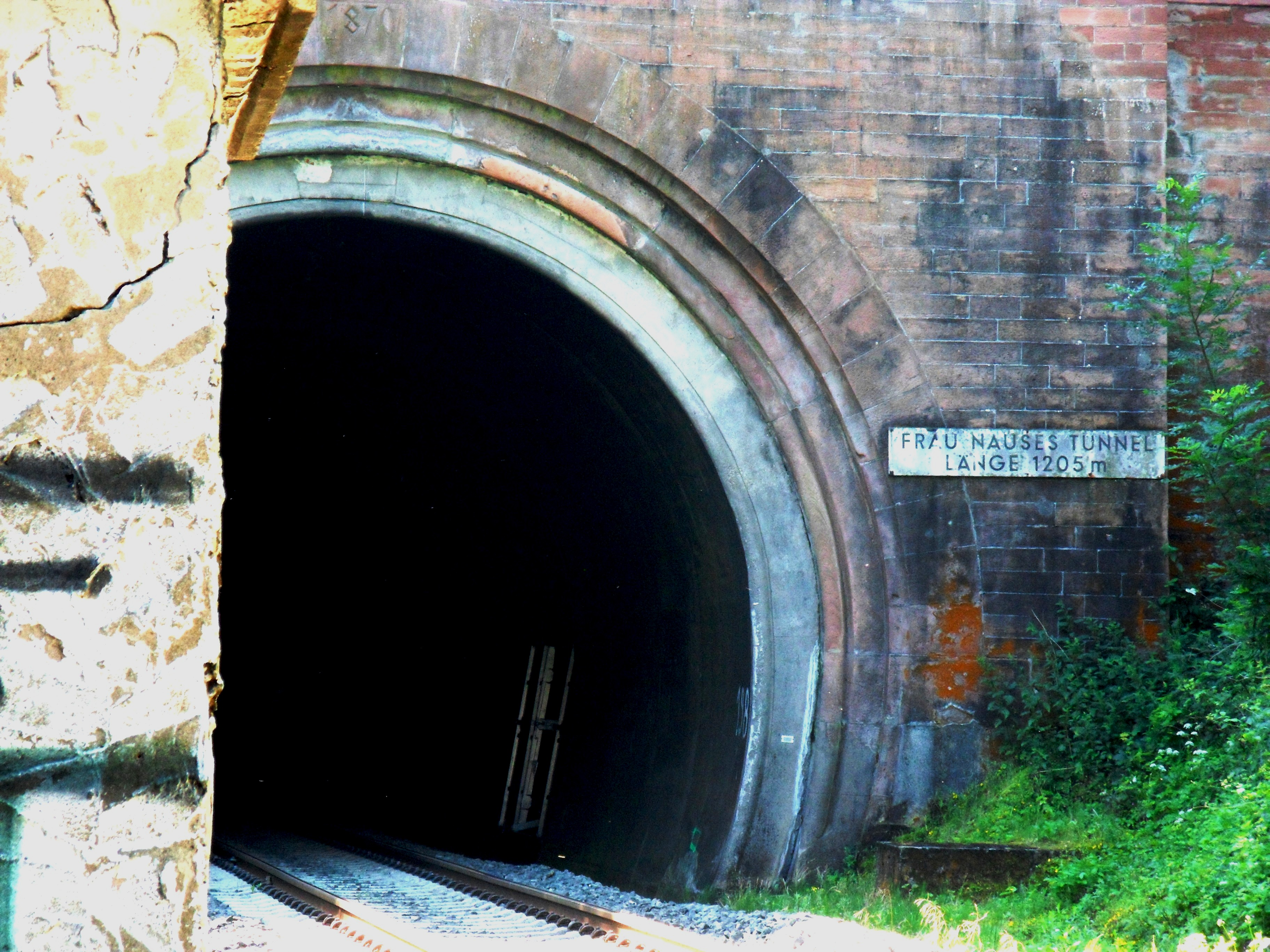 Detailfoto vom Nordportal des Frau-Nauses-Tunnels der Odenwaldbahn bei Frau Nauses